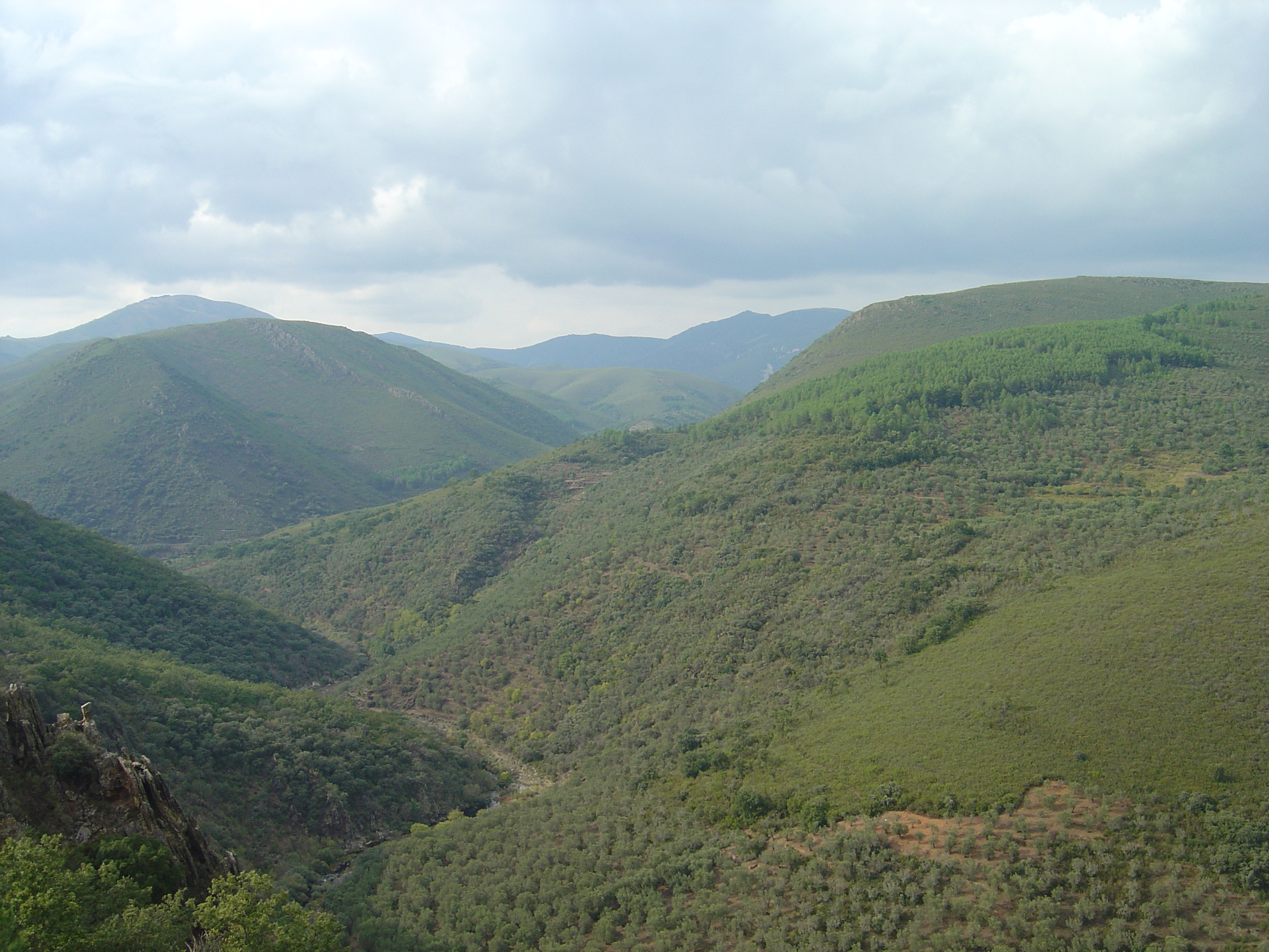 La Honfría, alrededores de San Esteban de la Sierra, España.